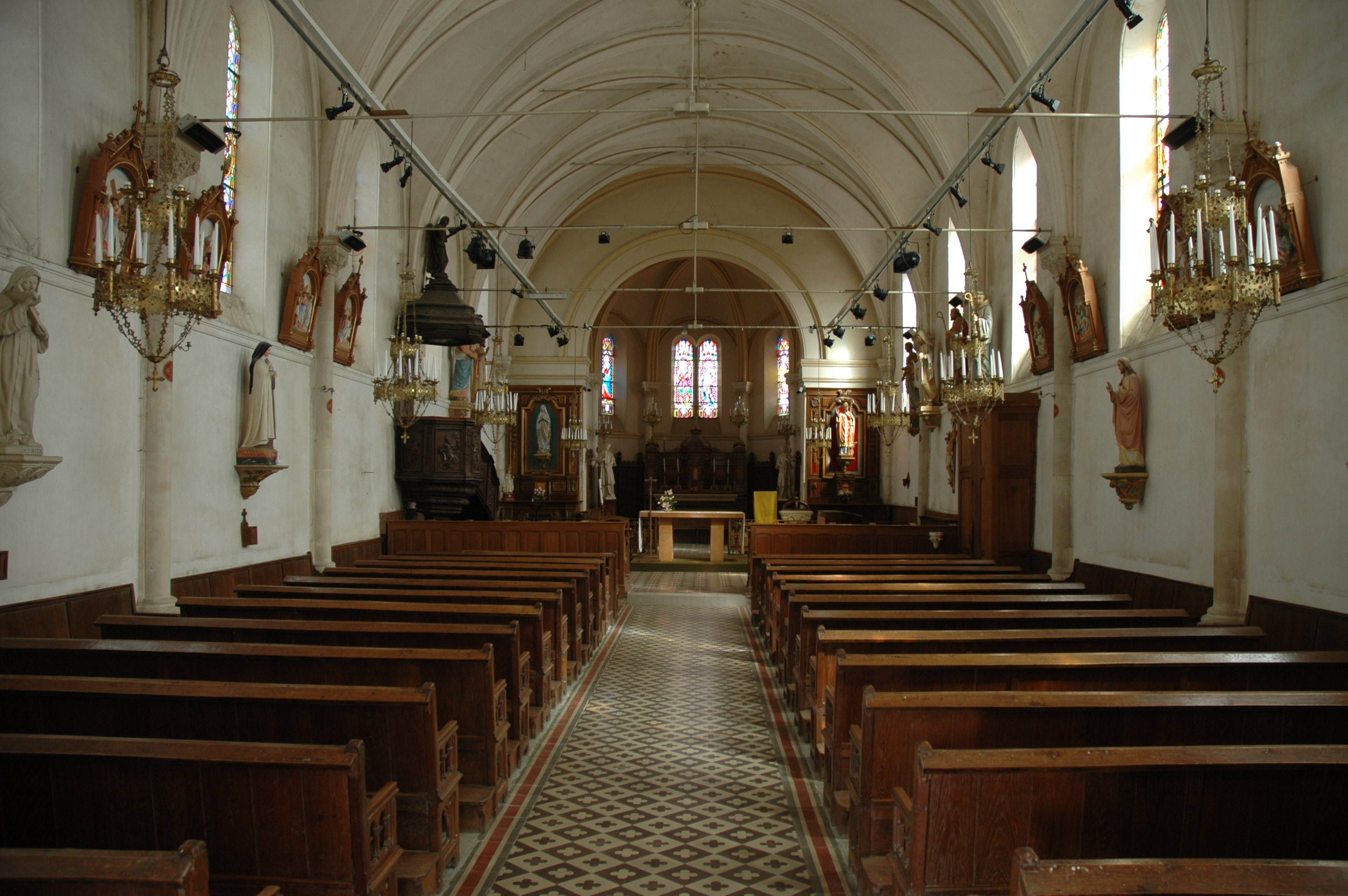 Eglise_Mesnil_Hubert.JPG Orne 61